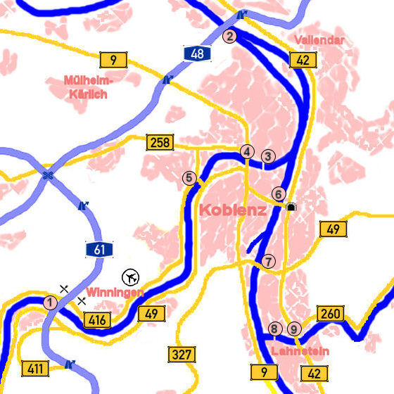 Beschreibung: Straßenkarte von Koblenz Legende Brücken: 1. Moseltalbrücke A 61 2. Bendorfer Brücke A 48 3. Balduinbrücke 4. Europabrücke 5. Kurt-Schumacher-Brücke 6. Pfaffendorfer Brücke mit Glockenbergtunnel 7. Südbrücke 8. Rudi-Geil-Brücke Lahnstein 9. Talbrücke Lahnstein B 42 Quelle: selbst erstellt Fotograf: Holger Weinandt Datum der Erstellung: 21.01.2006